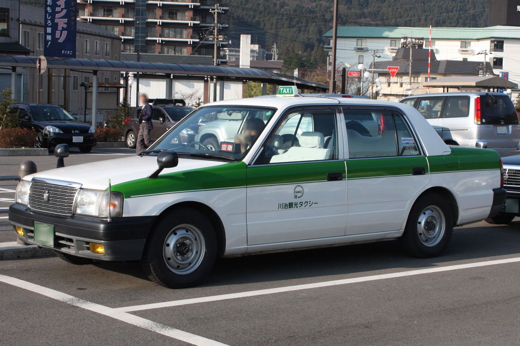 川治観光タクシー トヨタ・クラウンコンフォート